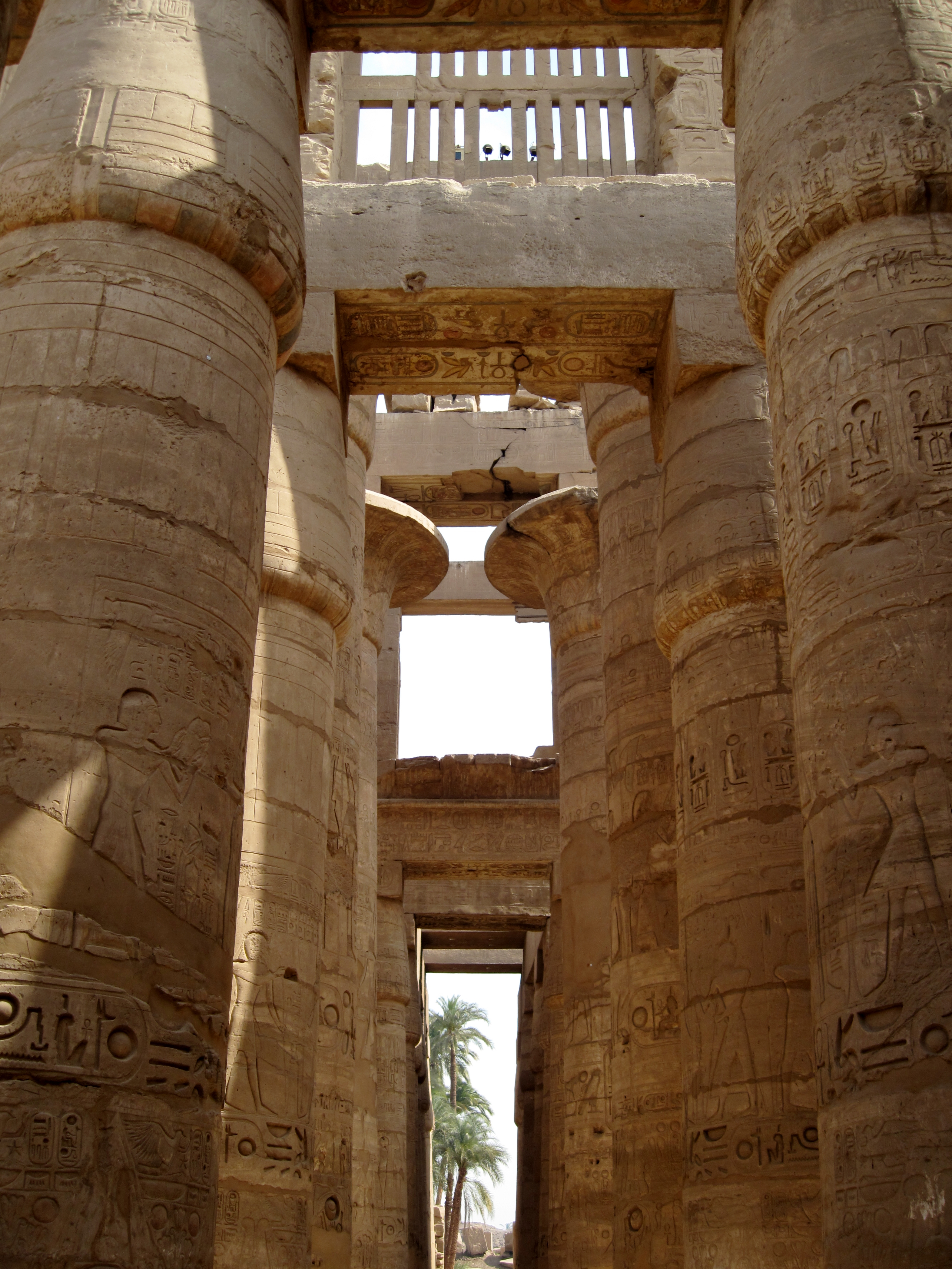 Große Säulenhalle im Tempel von Karnak nördlich Luxor, Ägypten